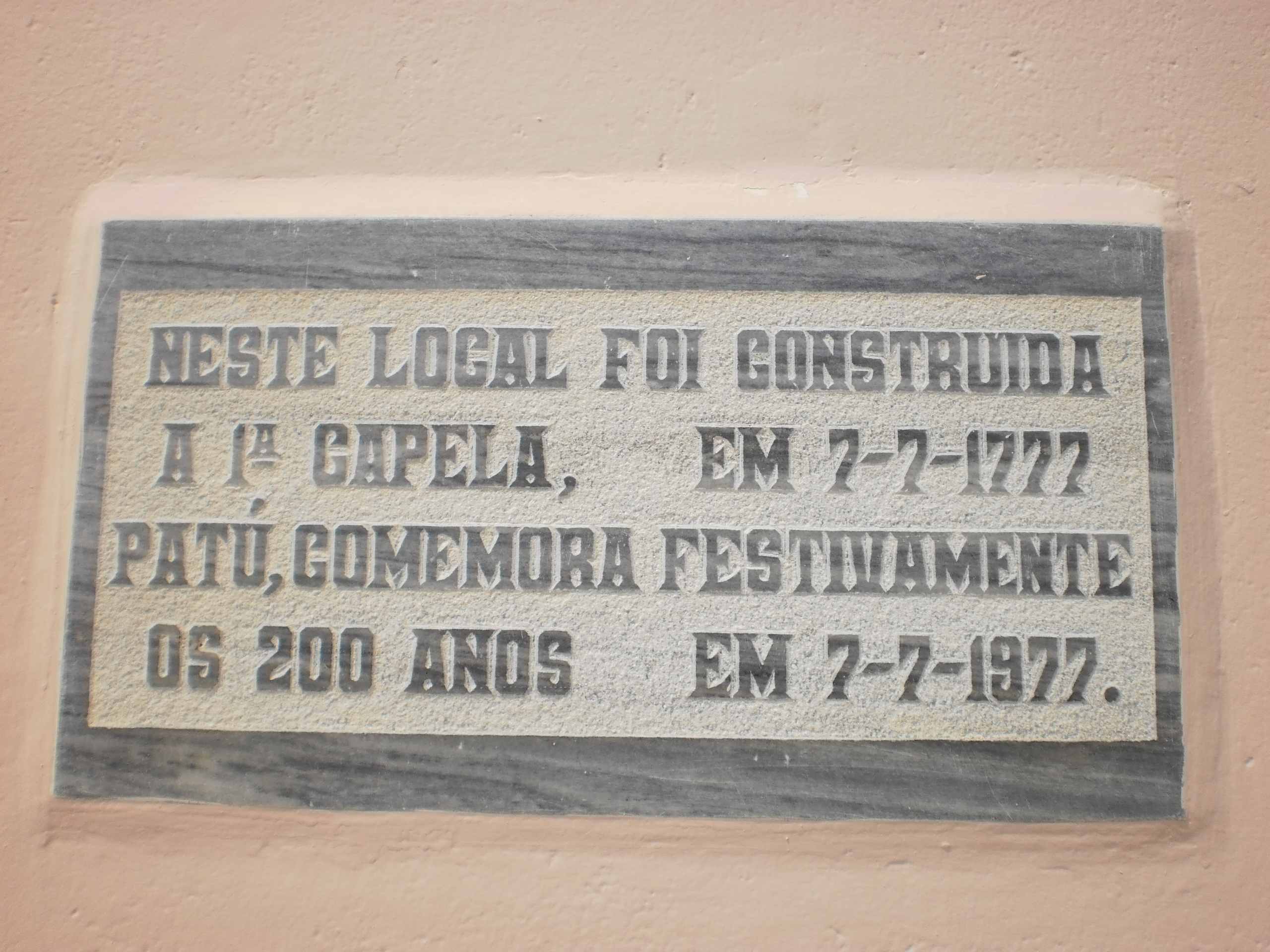 Placa comemorativa dos duzentos anos da capela de Nossa Senhora das Dores, hoje igreja matriz e sede da paróquia de Patu - Rio Grande do Norte, Brasil.